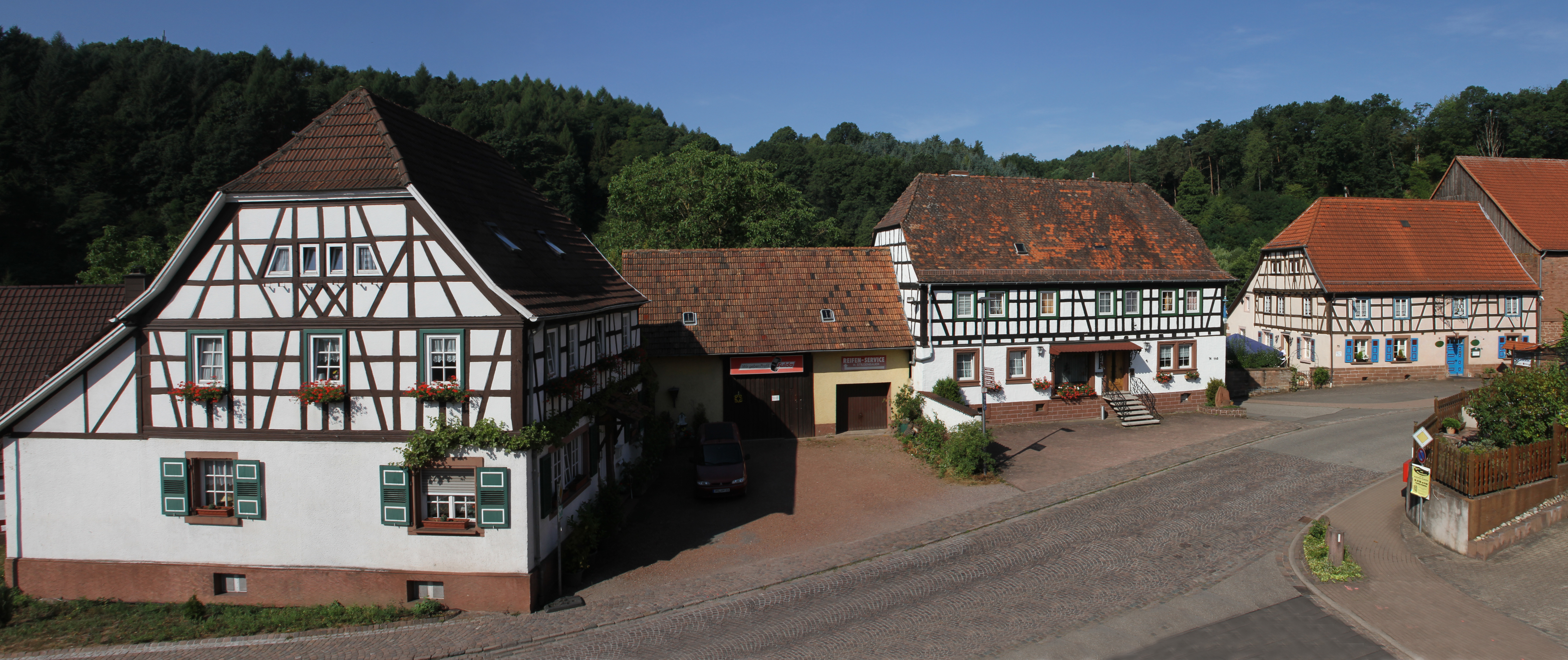 Bundenthal, Hauptstraße 72 bis 76; Fachwerkhäuser.